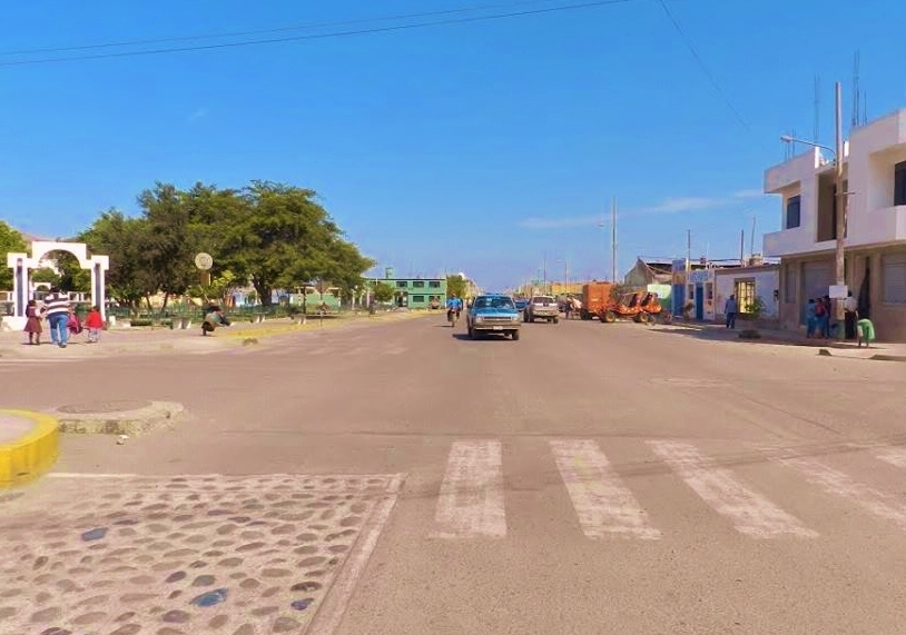 Avenida Enrique Brylka en Acarí, Arequipa, Perú.